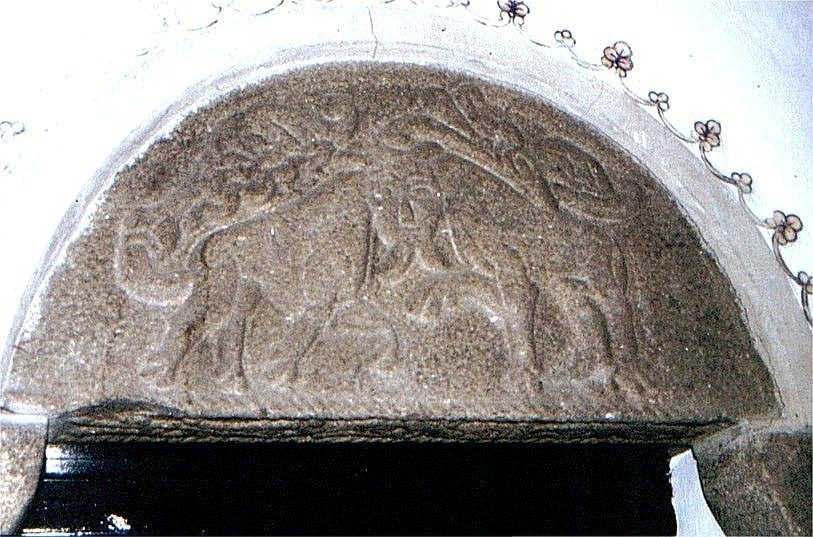 Svostrup Kirke, tympanon over vestdør